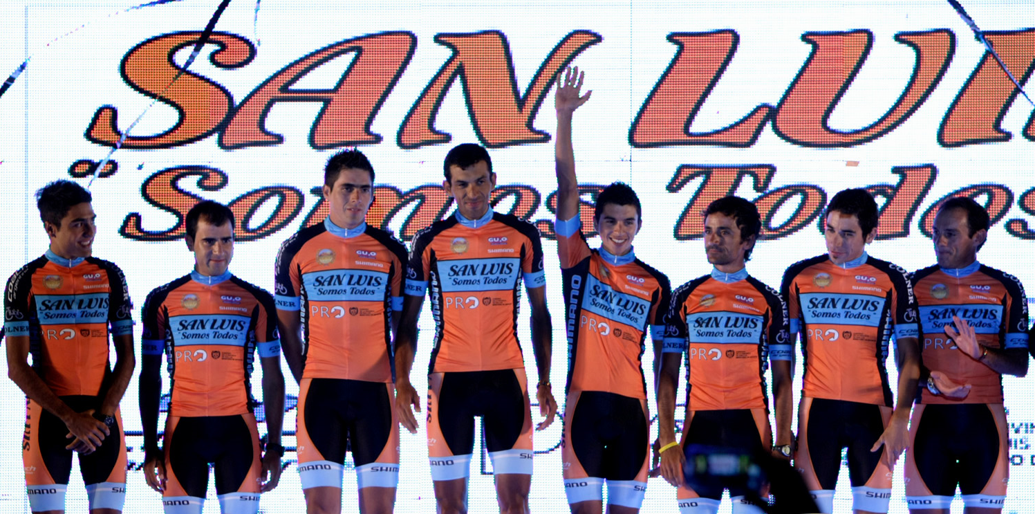 Equipo Ciclista Argentino San Luis Somos Todos. Presentación en el Tour de San Luis 2014